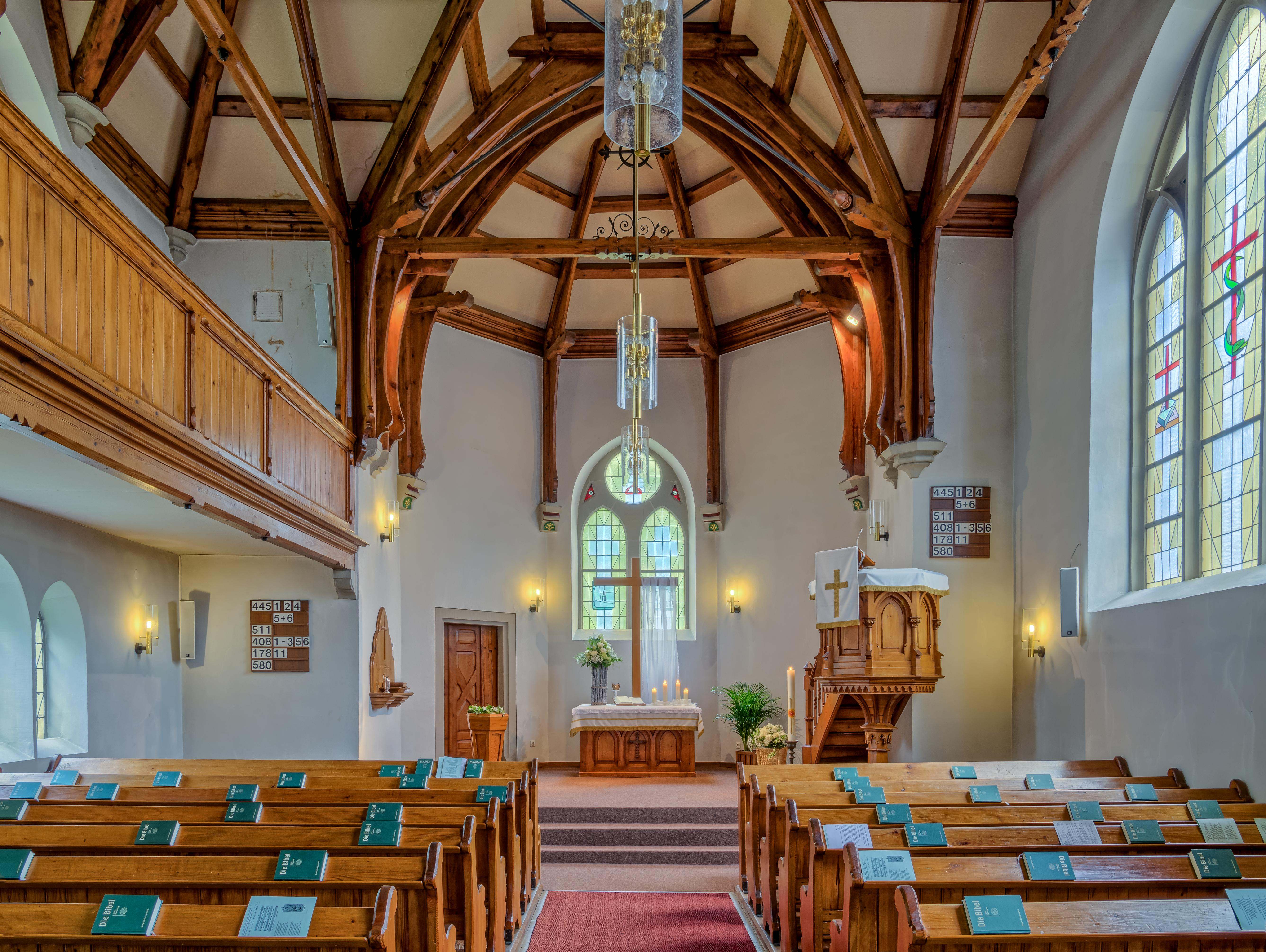 Bilder aus Staufen Innenansicht der Martin Luther Kirche in Staufen im Breisgau Blick zum Altar